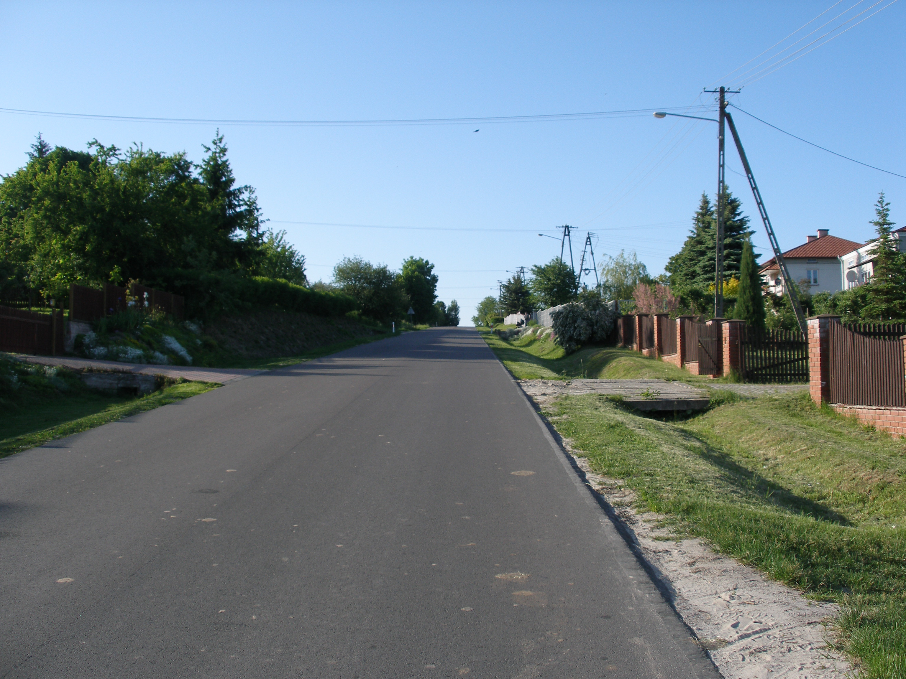 Kolonia Skierbieszów